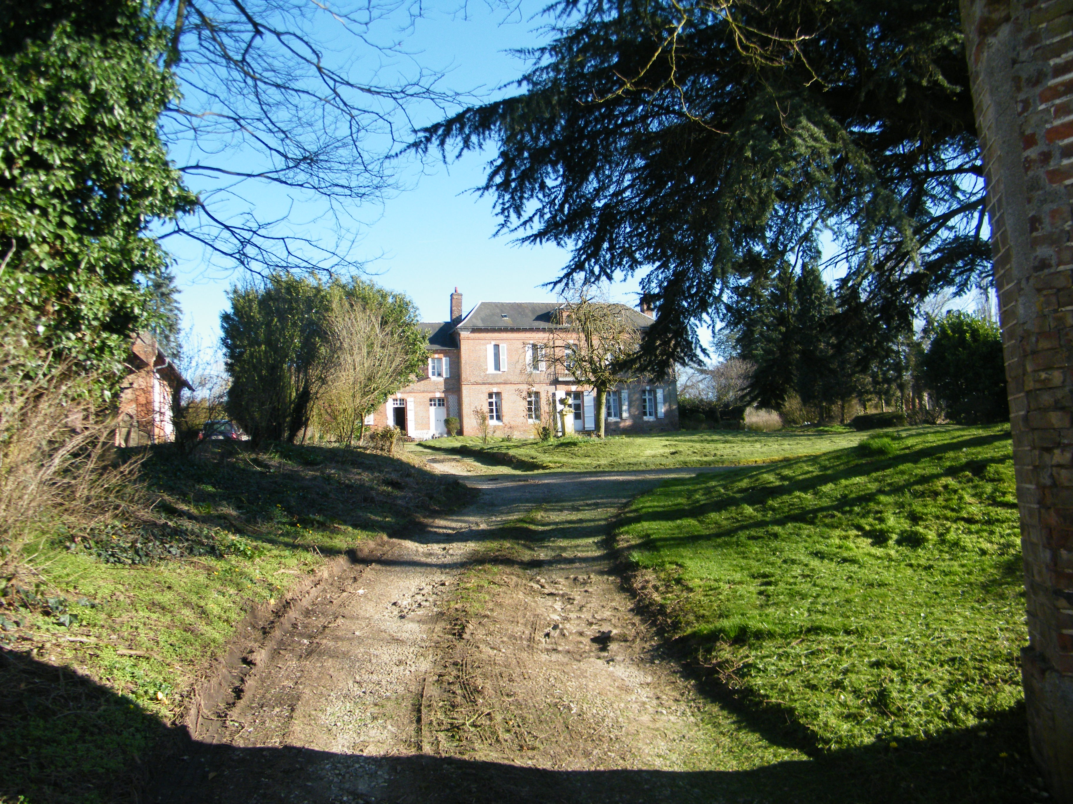 Le château, près de l'église.